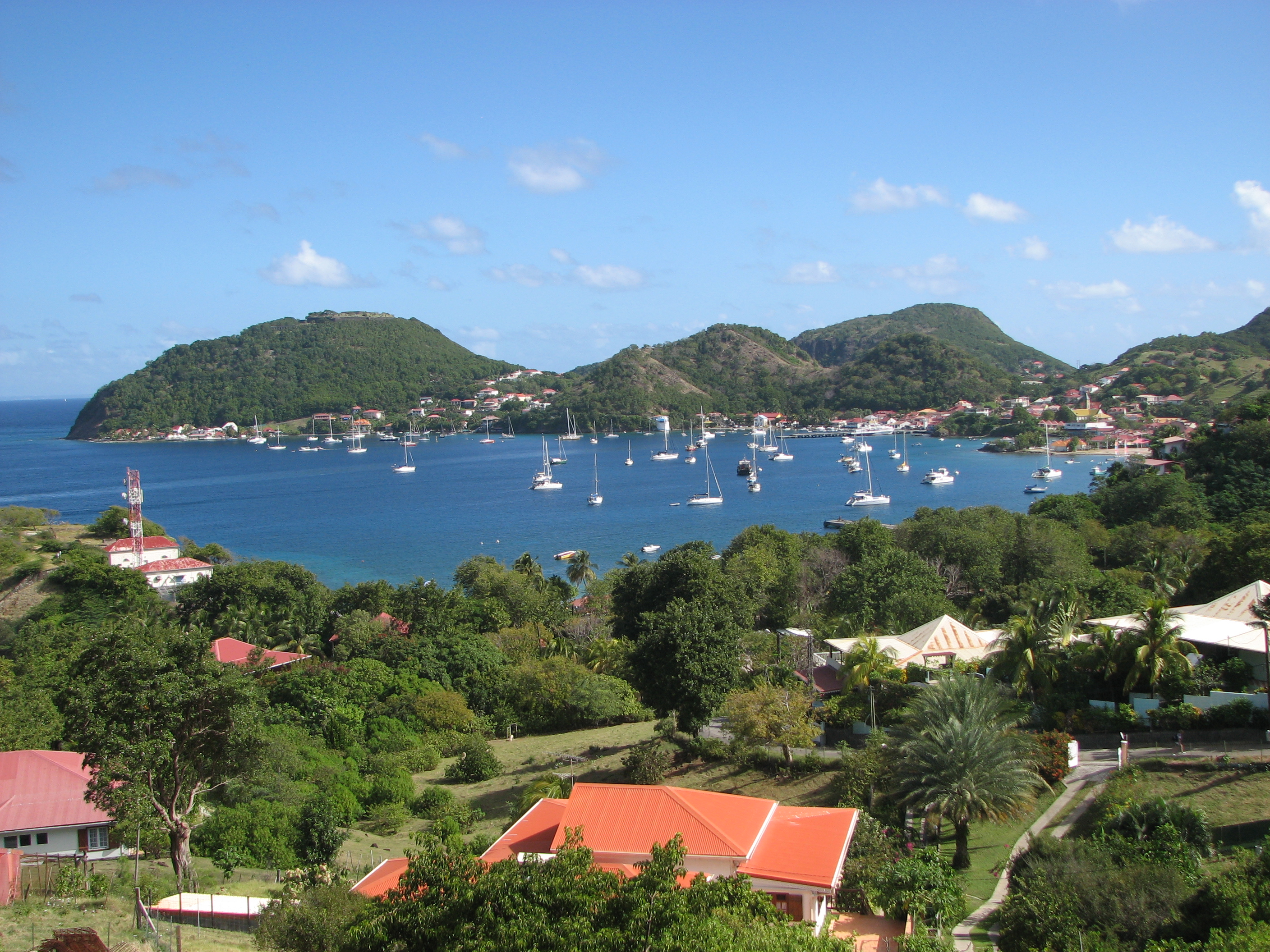 Baie des Saintes (Terre-de-Haut, Guadeloupe)